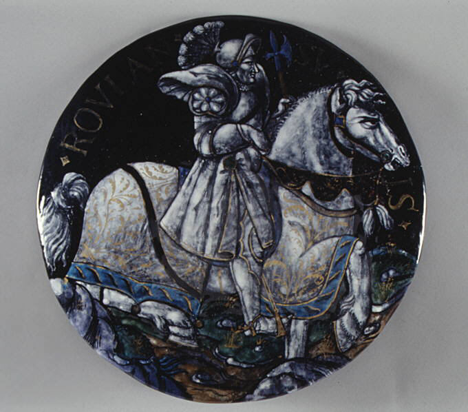 French, Limoges; Medallion; Enamels